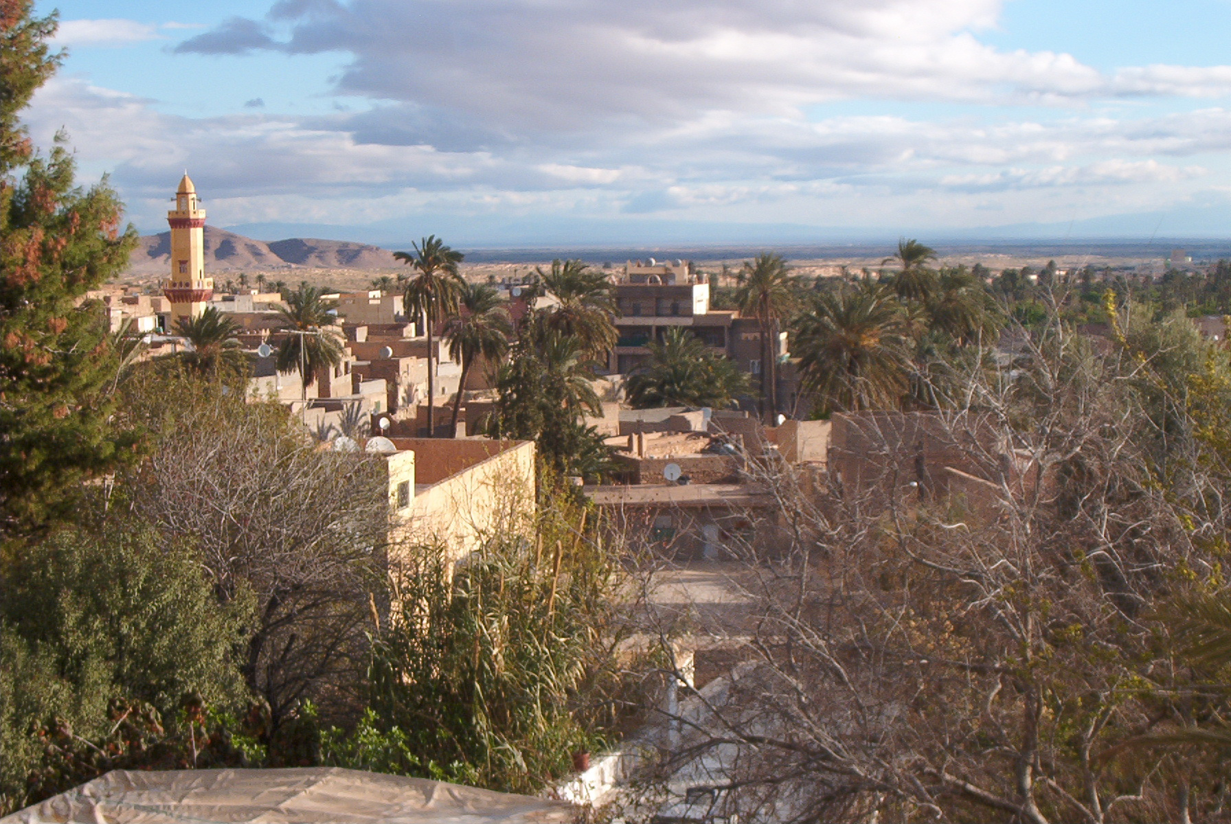 Les terrasses de Bou-Saada (wilaya de M'Sila, Algérie).